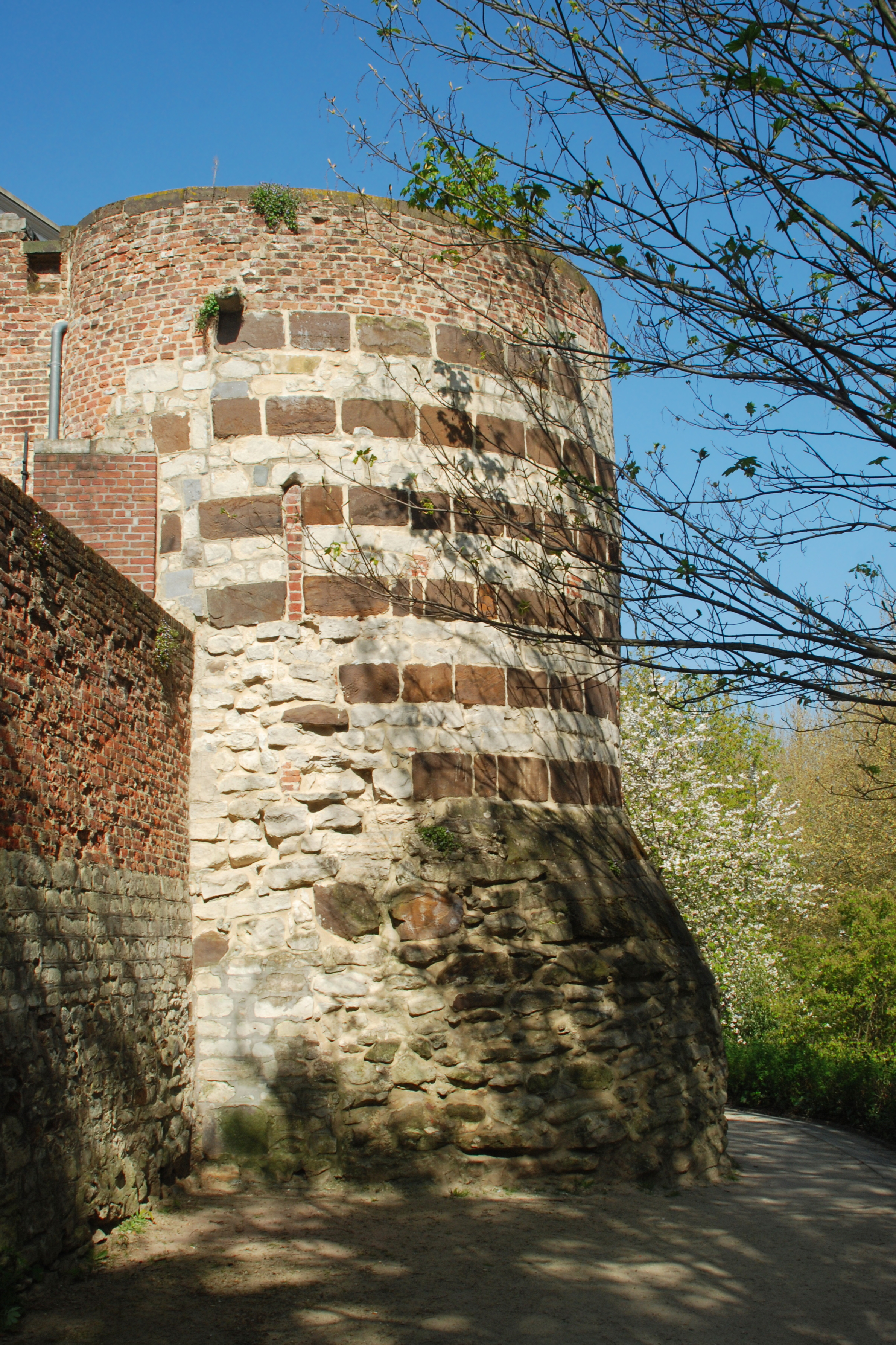 Belgique - Brabant flamand - Première enceinte de Louvain - Parc Saint-Donat - tour est